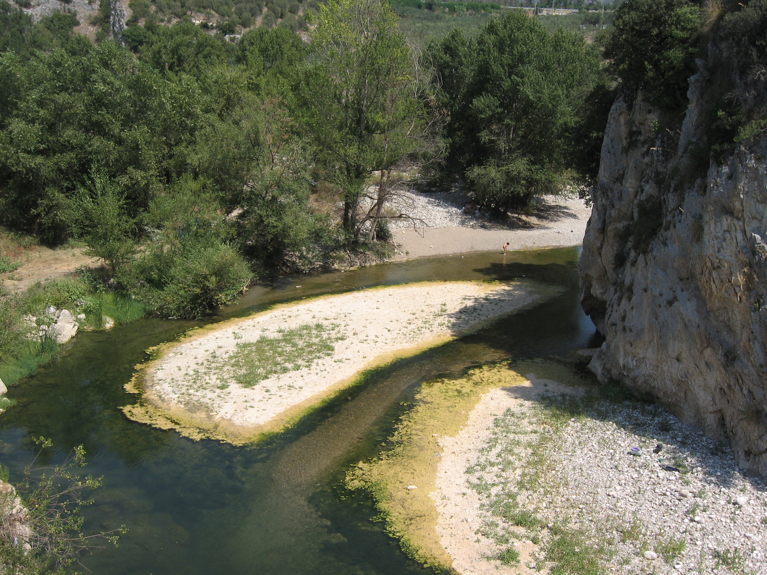 Fiume Bianco. Parco Nazionale del Cilento e del Vallo di Diano.